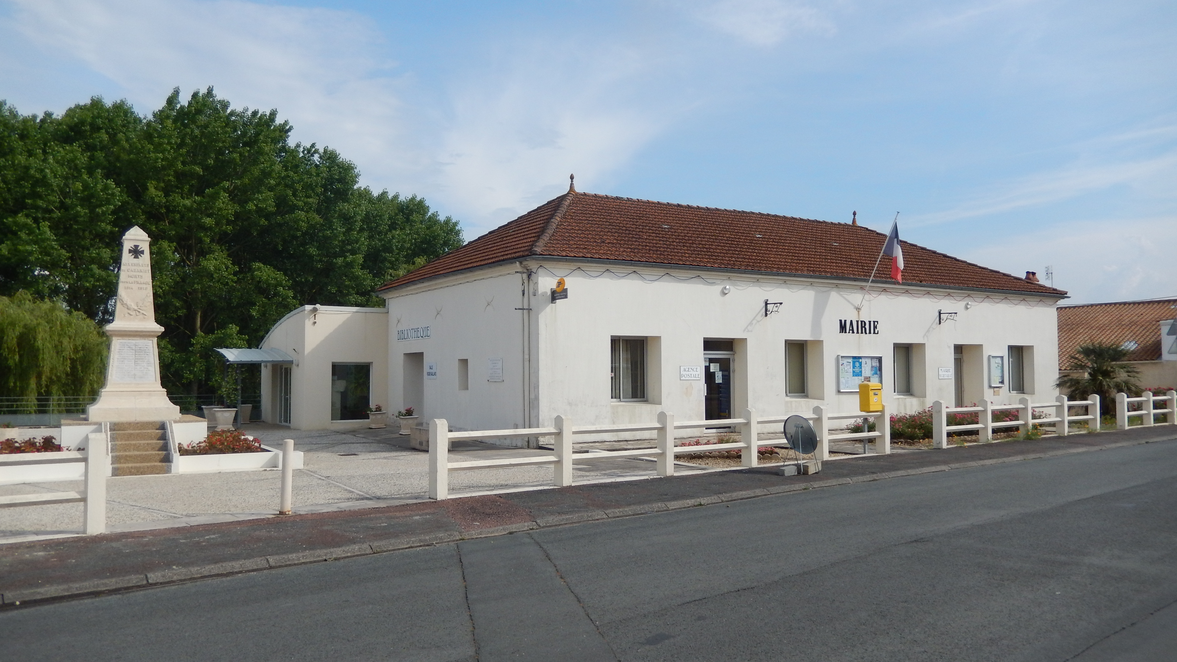 Le monument aux morts et la mairie de Cabariot (Charente-Maritime, France).